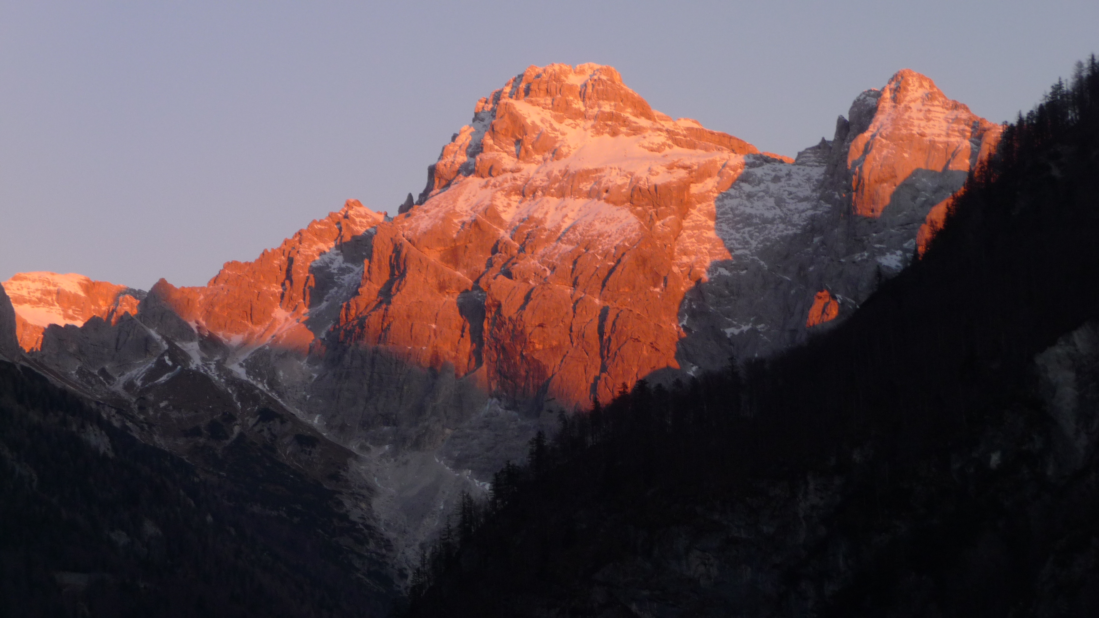 Razor in Planja v večerni svetlobi iz Zadnje Trente